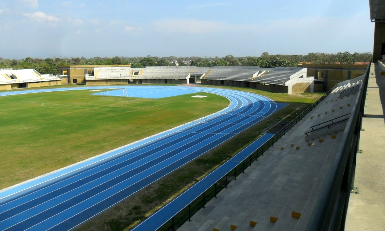 Vista desde Gradería Principal